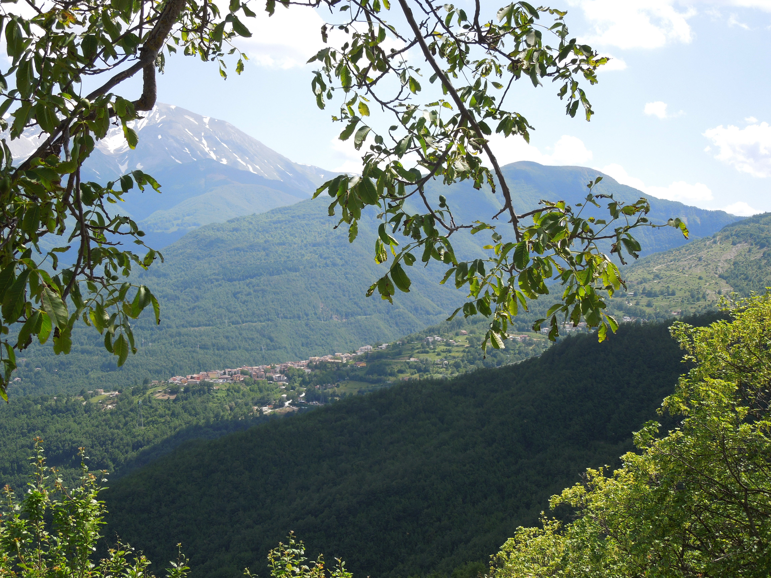 Panorama del paese di Tottea, frazione del comune di Crognaleto in provincia di Teramo.